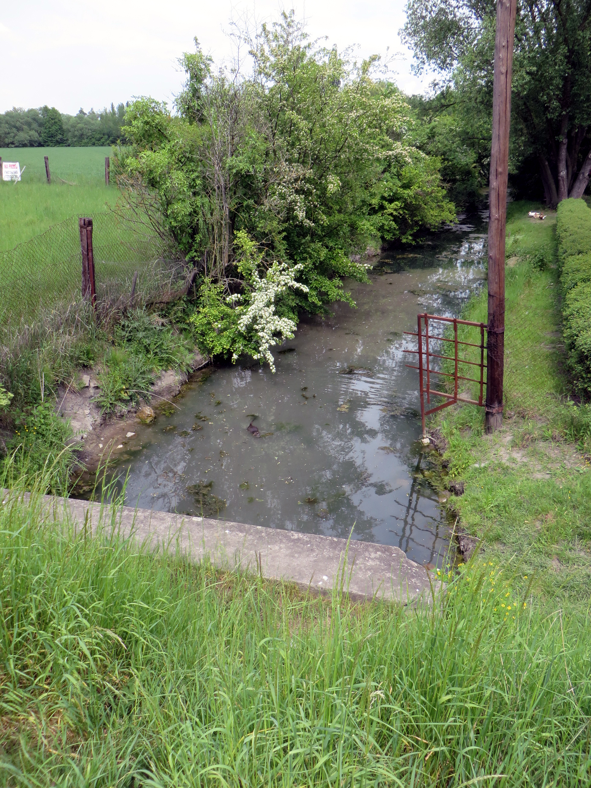 Nutrie v potoku Liduška v Nymburku. GPS: 50.1947869N, 15.0318242E